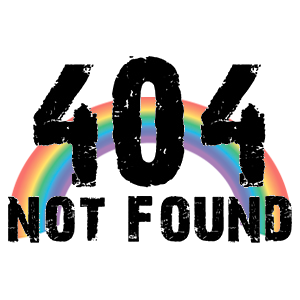 Логотип российского проекта «Дети-404. ЛГБТ-подростки. МЫ ЕСТЬ!»